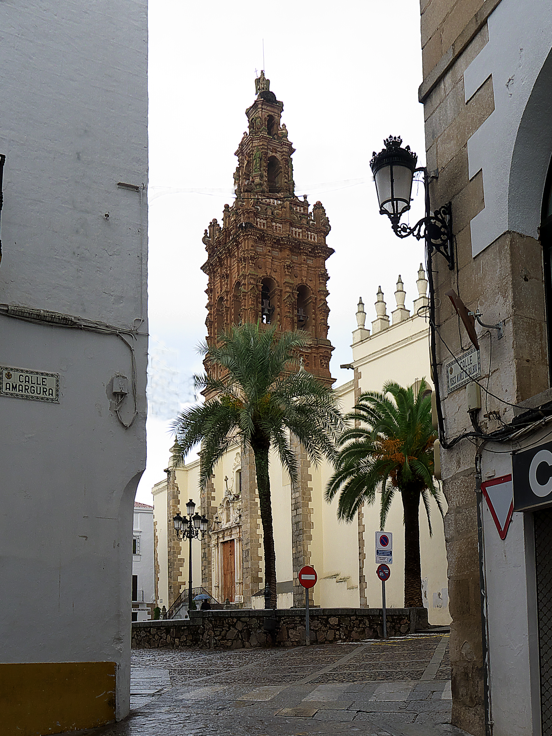 Vista de la iglesia.